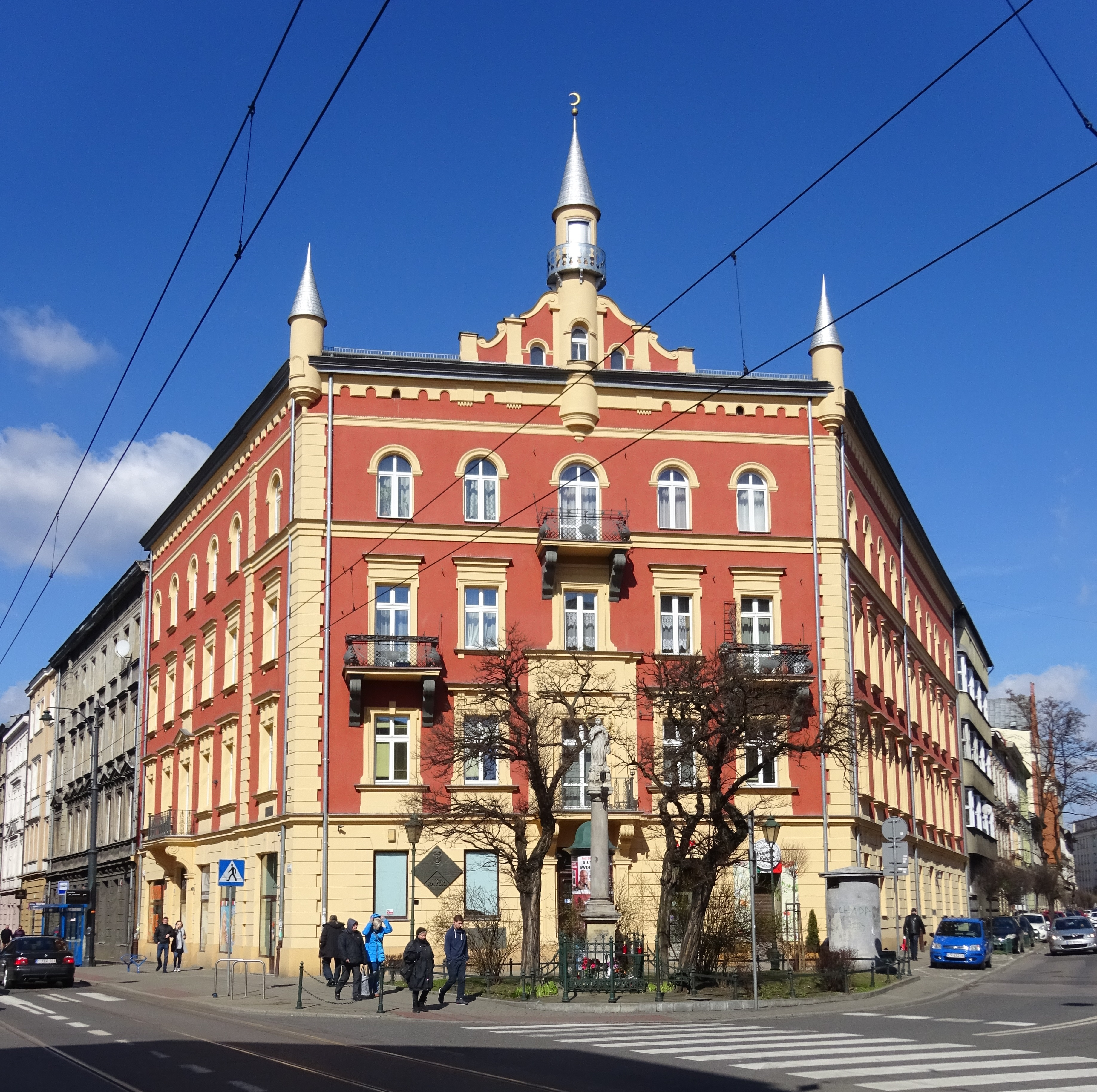 Dom Turecki w Krakowie na skrzyżowaniu ul. Długiej i Pędzichowa. 2017